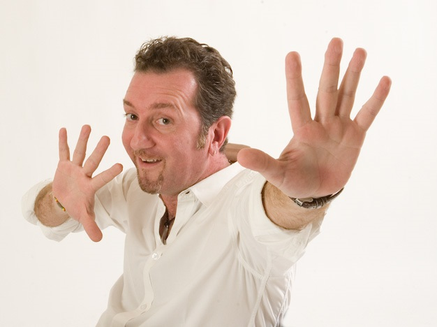 Gabriele Bròcani